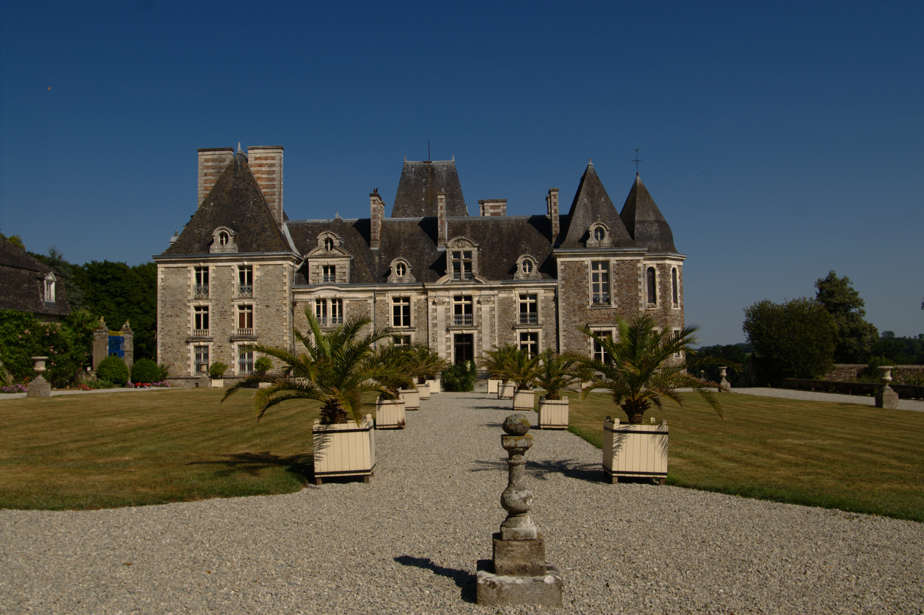 Château du Bois-Bide à Pocé-les-Bois (Ille-et-Vilaine, France).